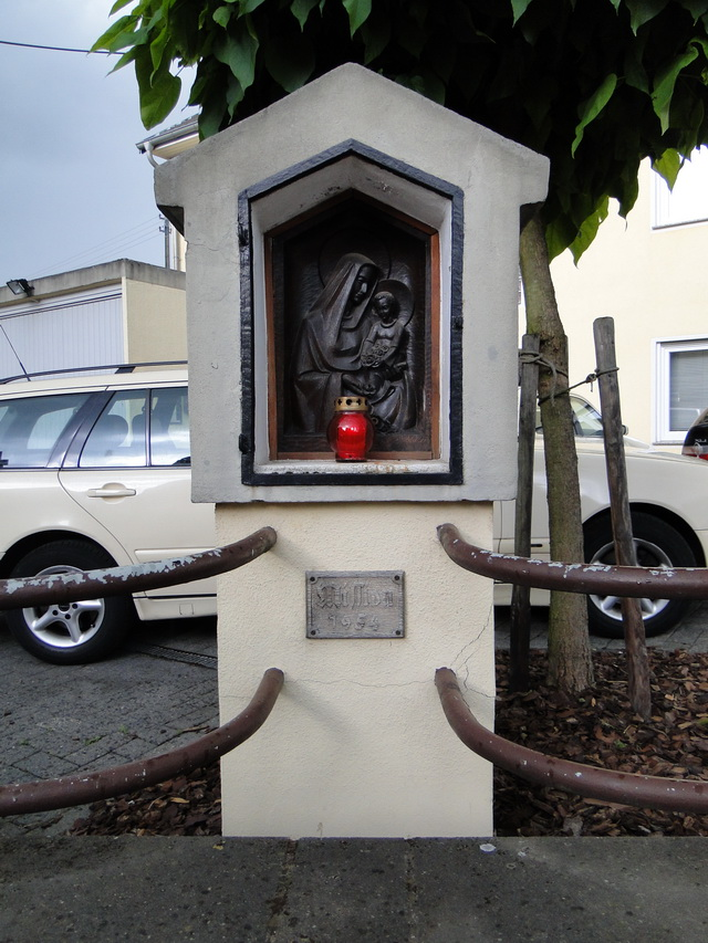 Der Bildstock aus dem Jahr 1954 befindet sich an der Oberdorfstraße 20, am Fußweg zur Sankt Joseph-Kirche. Inschrift: keine